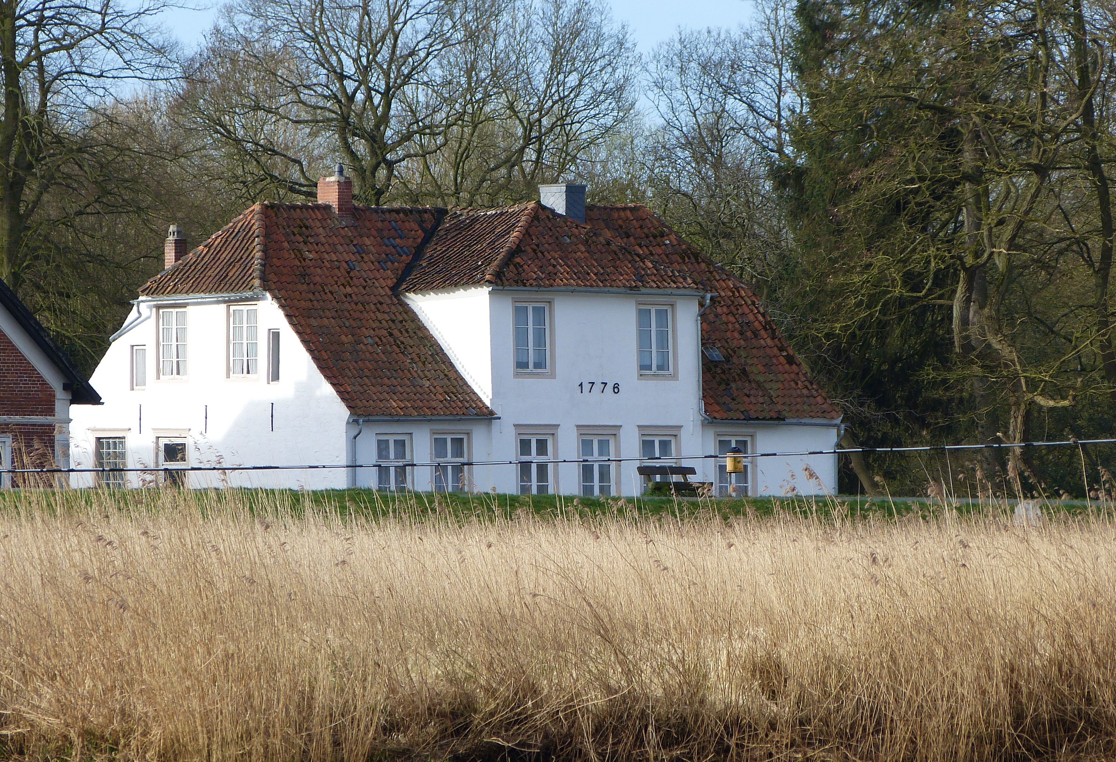 Doktorhaus in Bremen, Lesumbroker Landstraße 110. Gesehen vom nördlichen Lesumufer, im Vordergrund Röhricht und Deich des südlichen Lesumufers (Landschaftsschutzgebiet „Werderland und Lesumröhrichte“).Das abgebildete Objekt ist ein geschütztes Kulturdenkmal in der Freien Hansestadt Bremen, mit der Nr. 1297 beim Landesamt für Denkmalpflege registriert.